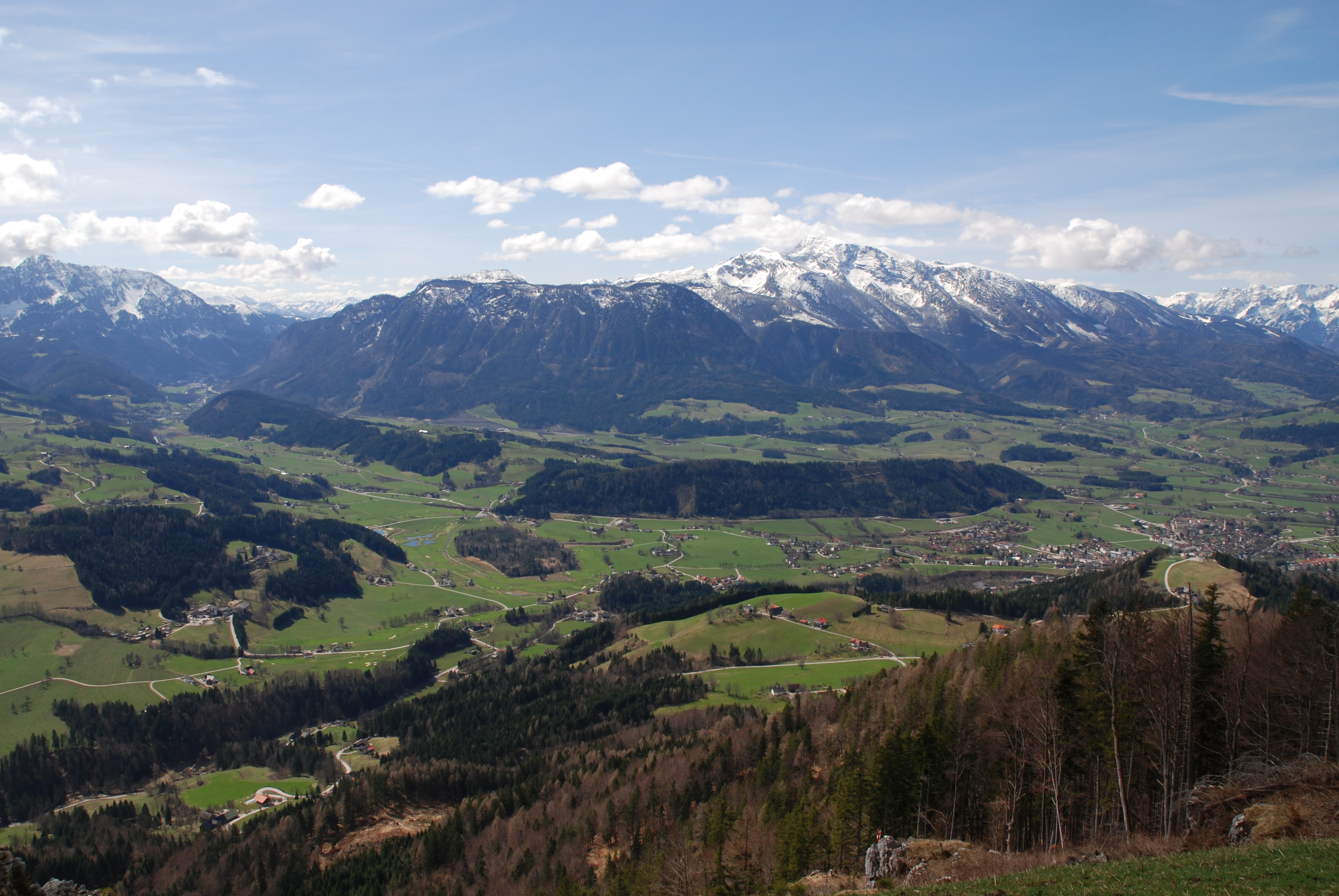 Blick vom Kleiner Berg bei Windischgarsten auf das Windischgarstner Becken, Im Hintergrund der Warscheneckstock